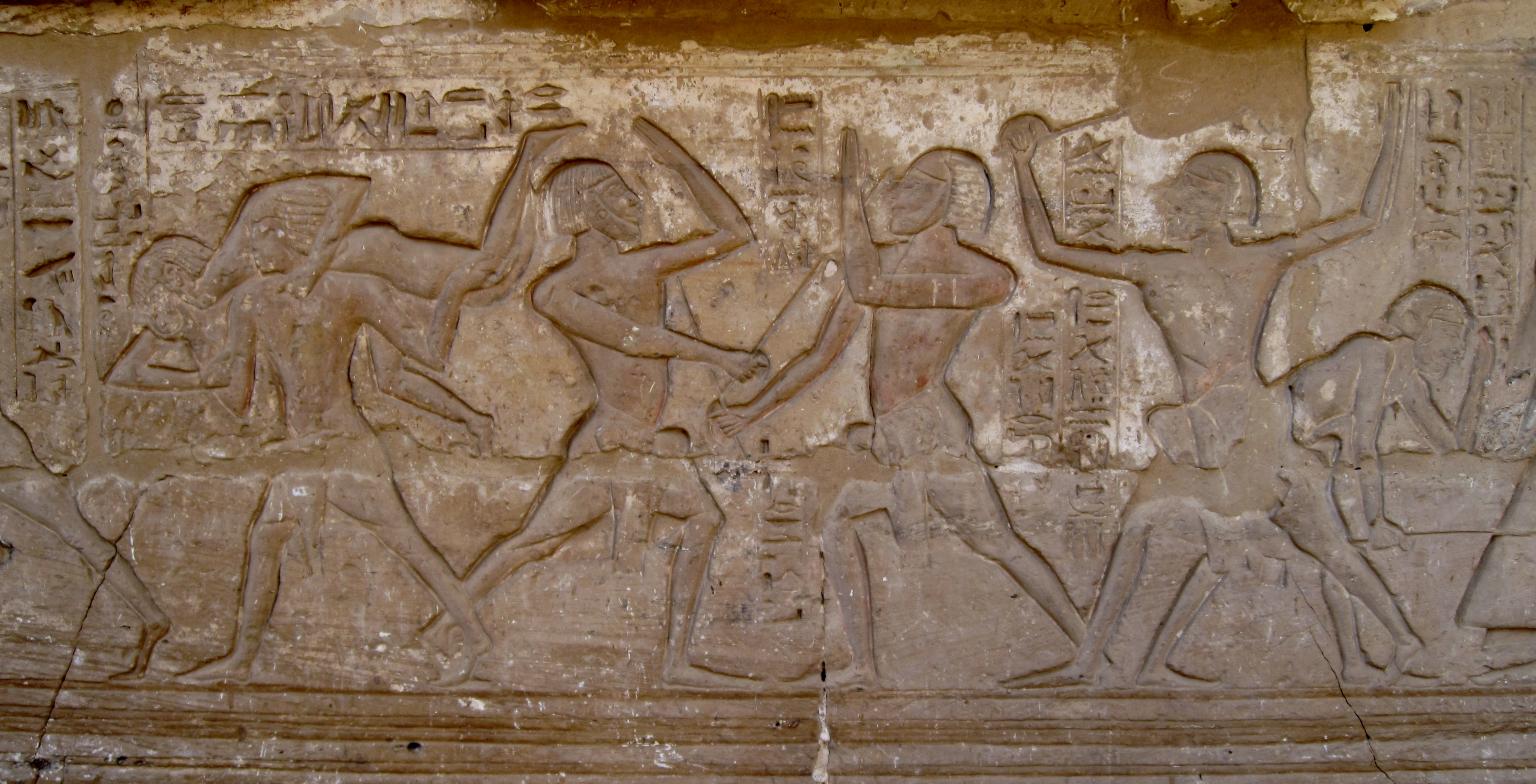 Relief im ersten Hof des Totentempels Ramses’ III. in Medinet Habu, Ägypten